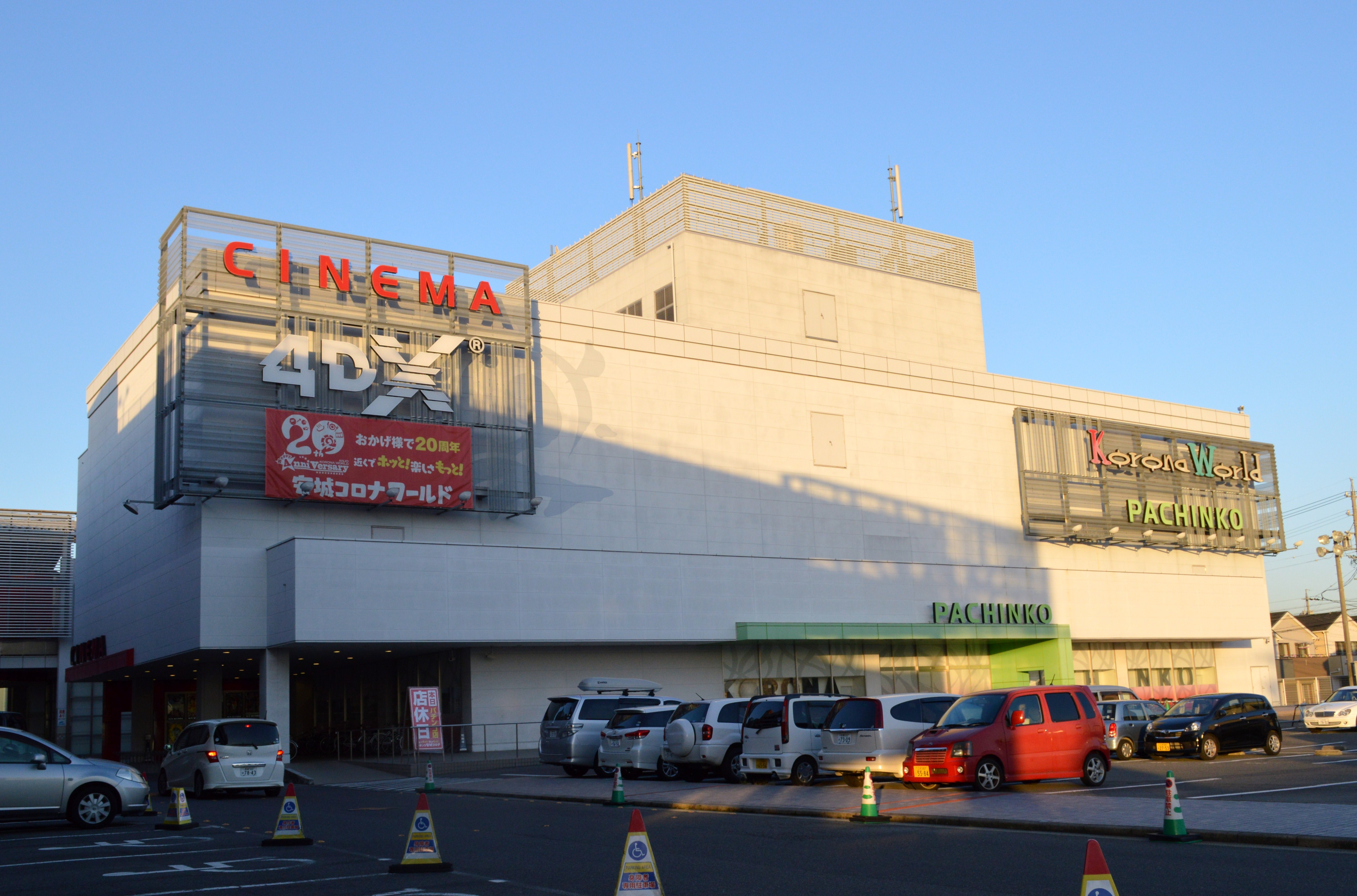 安城コロナシネマ